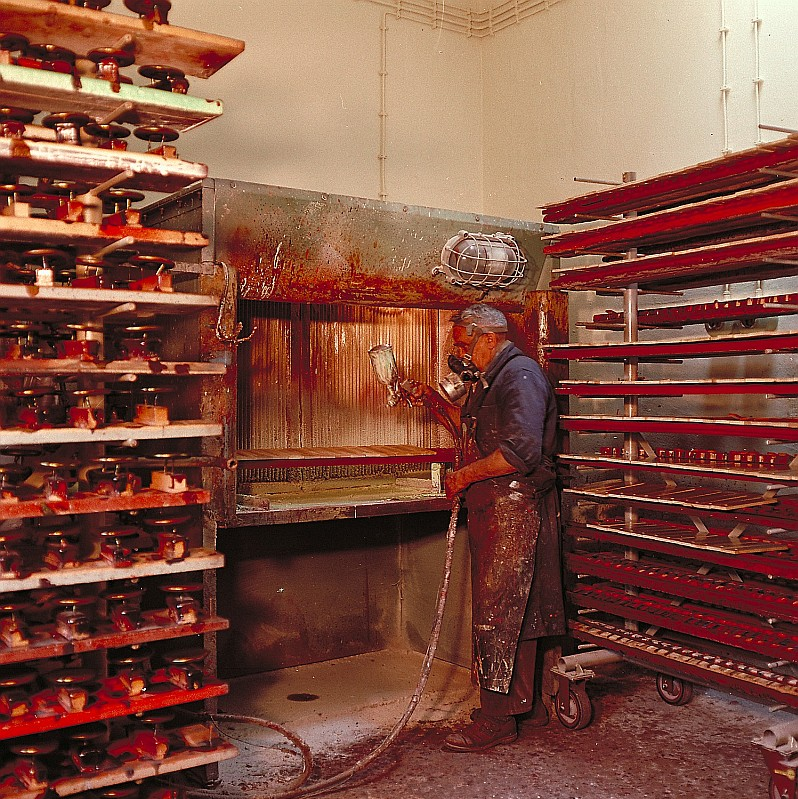 Original image description from the Deutsche Fotothek Lackierer